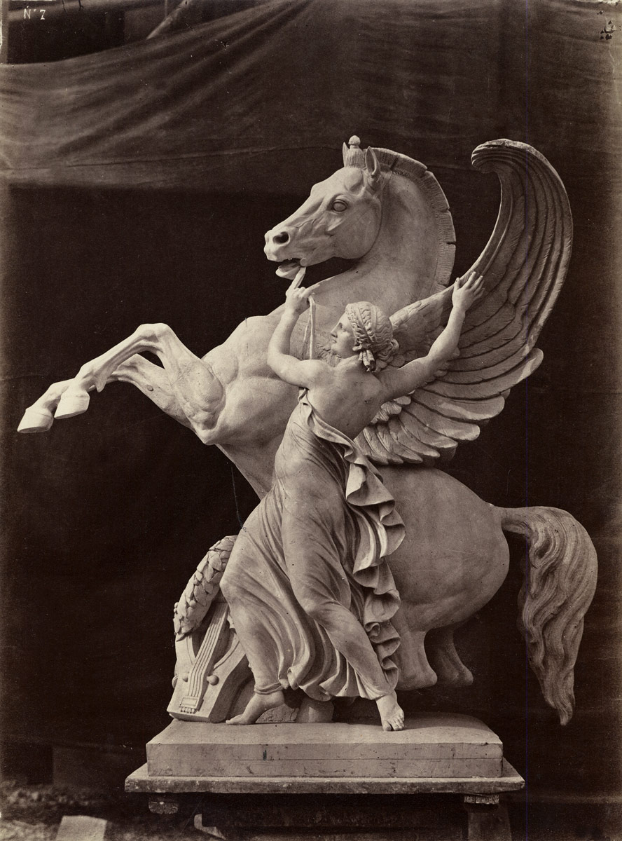 Le Nouvel Opéra de Paris. Statues décoratives (35 planches) Groupes de la façade principale: Planche 7: Pégase (par Lequesne)